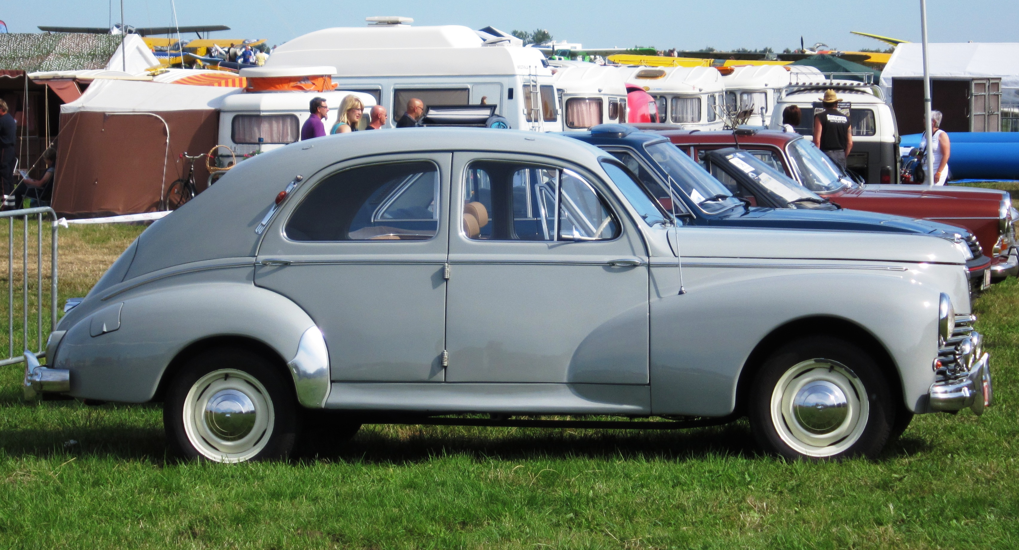 Peugeot 203 Seitenansicht